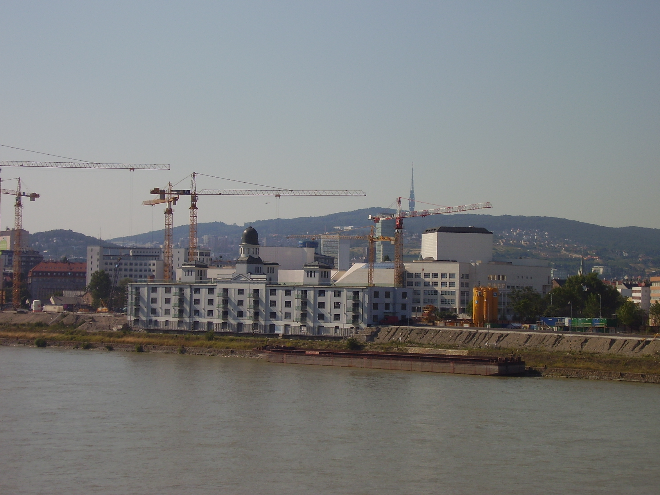 Bratislava